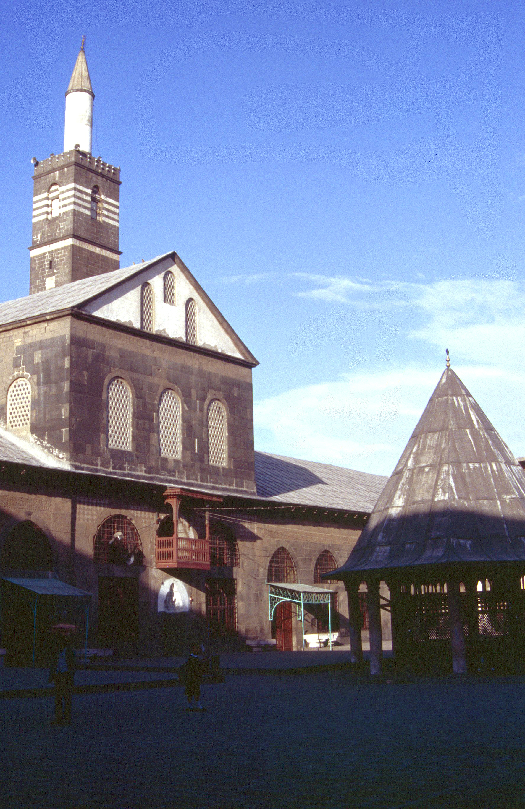 Hof der Ulu Cami in Diyarbakır